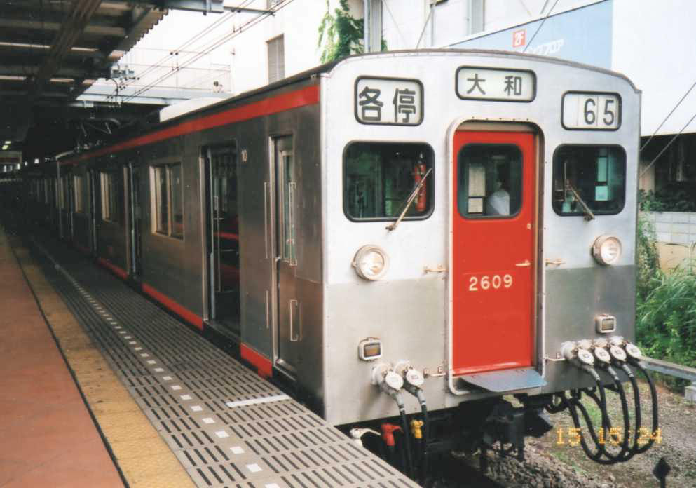 Sagami Railway(Sotetsu), EMU Type 2100 At Futamatagawa Sta.